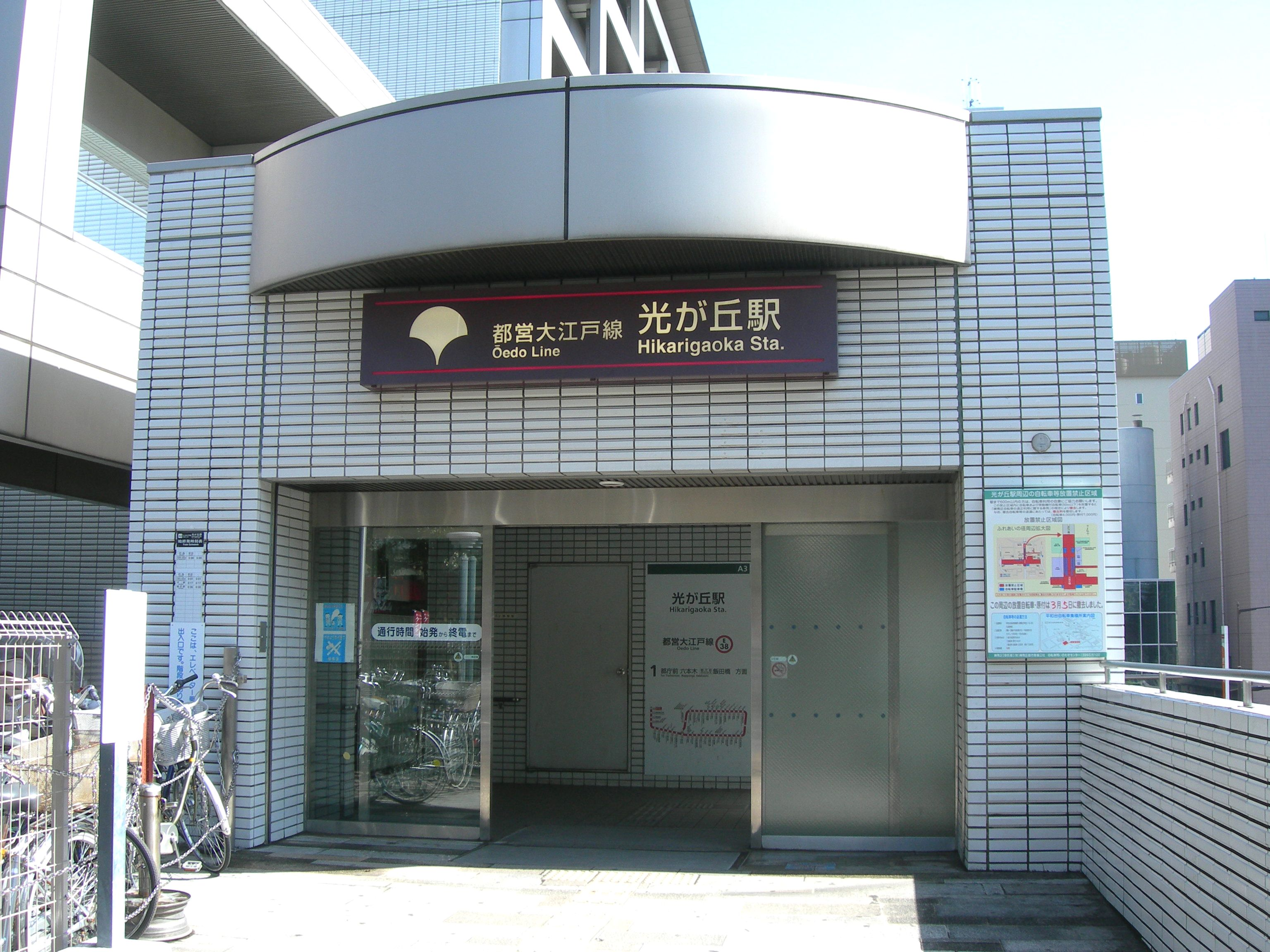 光が丘駅A3出入口